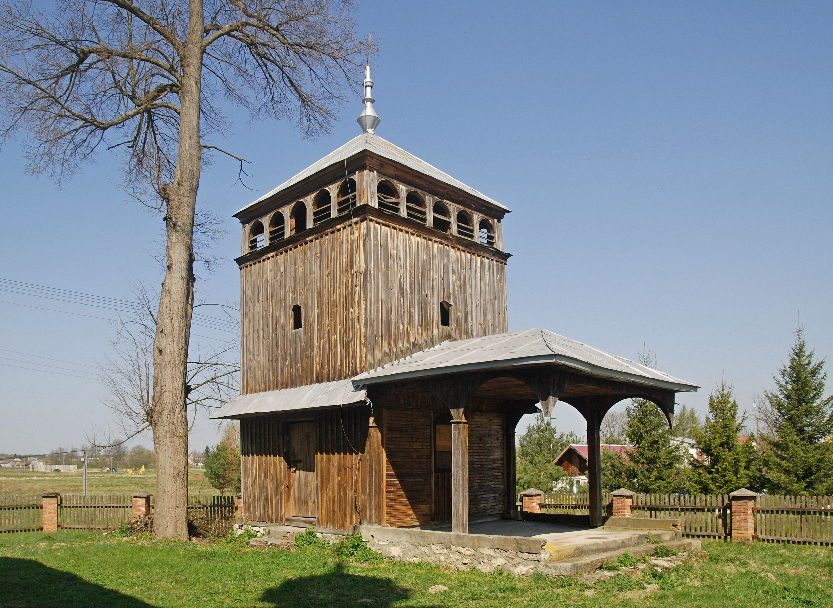 wieś Dachnów, cerkiew Podwyższenia Krzyża Świętego Wikidata has entry Q9187022 with data related to this item.